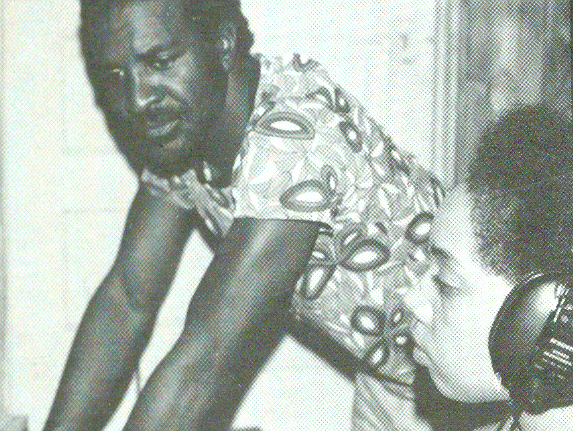 Wendell Harrison (En la imagen, Wendell Harrison con Pamela Wise en las sesiones de grabación de "Dreams of a love supreme". Fotos de Patrricia Harrison. )